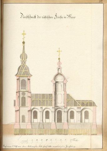 Scan from Johann Christoph Brotze's book Sammlung verschiedner Liefländischer Monumente. Durchschnitt des rußischen Kirche in Werro. Nach einer 1789 von dem Baumeister Joh. Carl Otto verfertigten Zeichnung [die Ansicht].